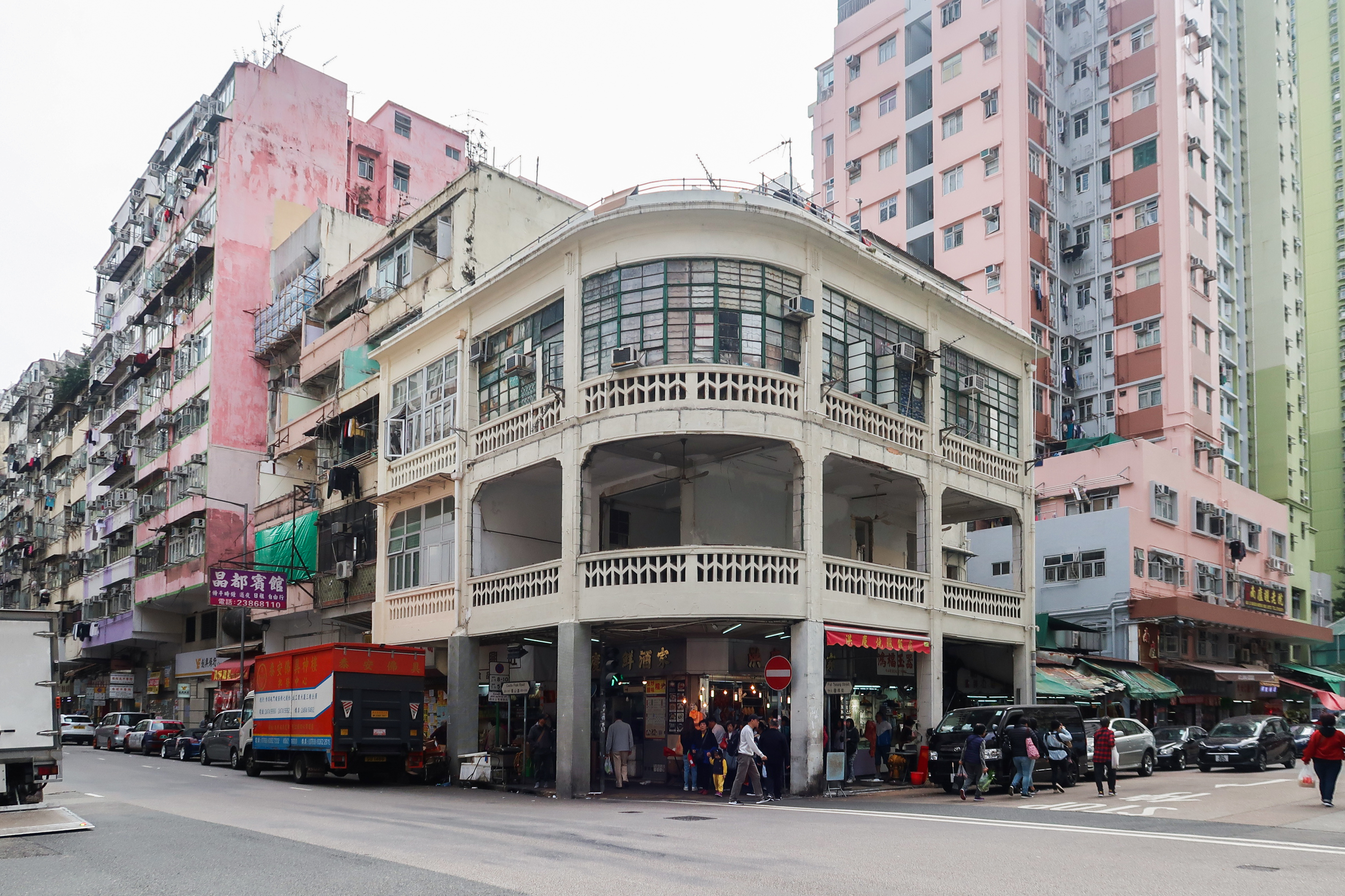 Castle Peak Road 301-303